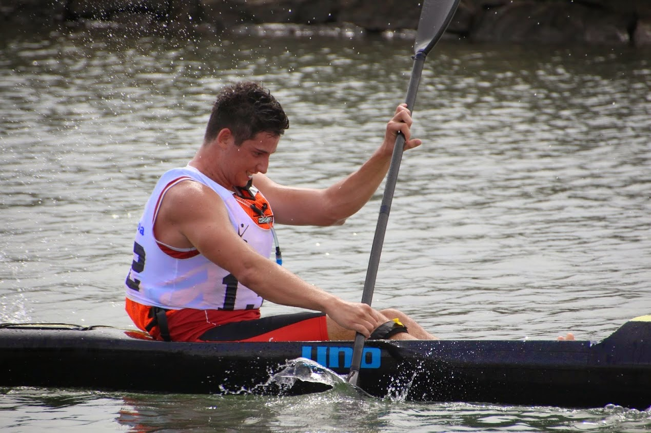 Yon Darío Bravo sobre un surfski